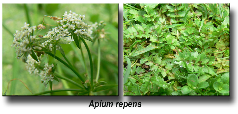 Population ancienne d'Ache rampant (plante rare en France) ayant survécu dans un jardin public, et qui fait aujourd'hui l'objet d'une gestion conservatoire (Nord de la France)